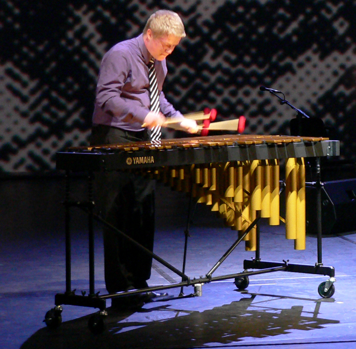 Vibraphonist Henning Brungs Tritonüsse bei Verleihung Praetorius Musikpreis 2012